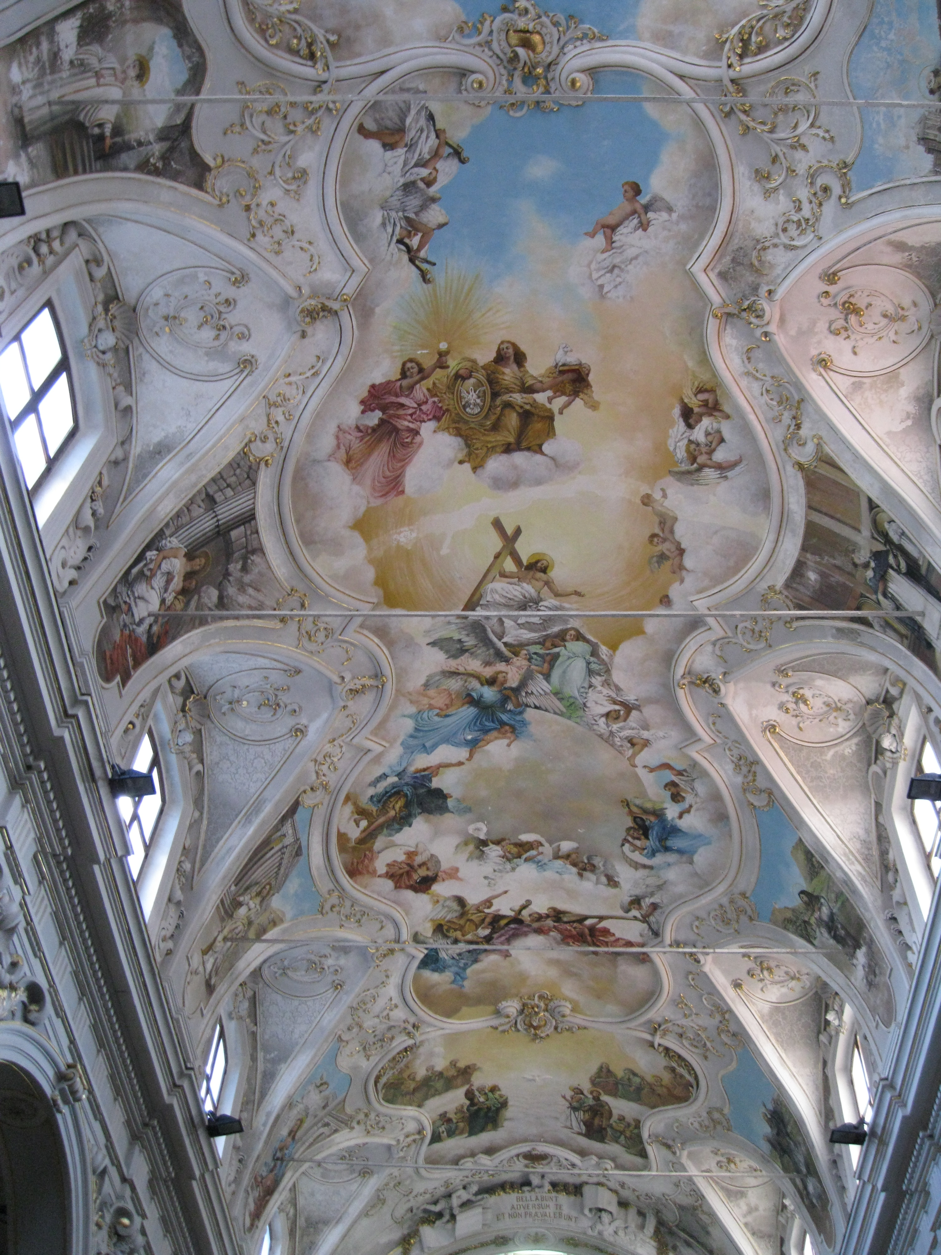 Il duomo di San Giorgio Martire a Caccamo, nella città metropolitana di Palermo.